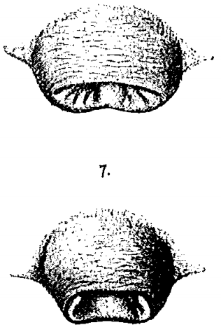 Illustrazione di due epigini di Erigone arctica da: Kulczyn'ski, W. (1902b) - Zoologische Ergebnisse der russischen Expeditionen nach Spitzbergen. Araneae et Oribatidae. Iejegol. Zool. Mouz. Akad. Naouk St. Petersbg. vol.7, pp. 335-354